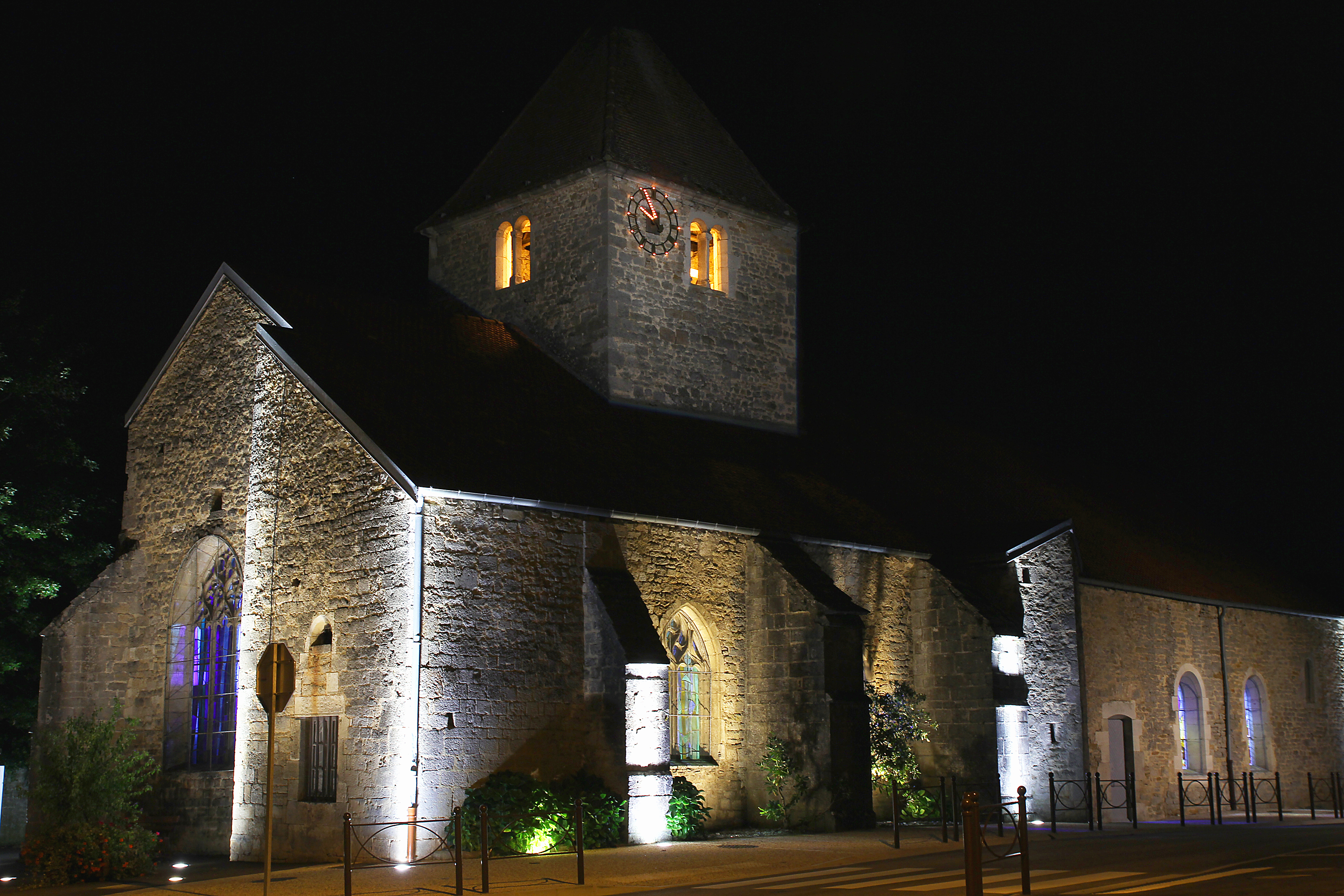 Eglise romane de Nogent-le-bas .